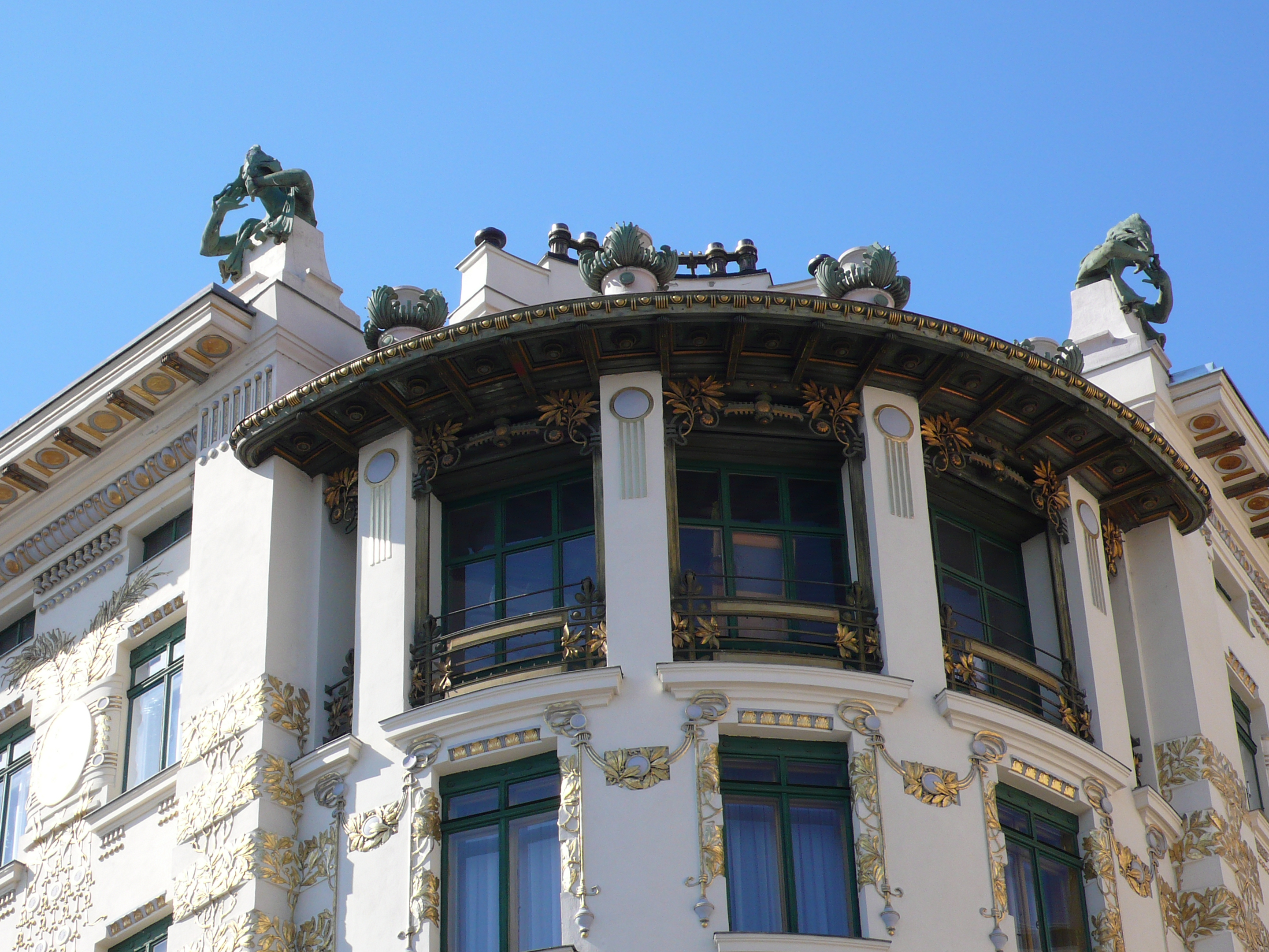 Wien, Wienzeile 38, Detail; Otto Wagner